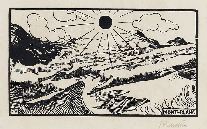 MONT-BLANC. Holzschnitt. Handsignierter Abzug. 14 x 25 cm.